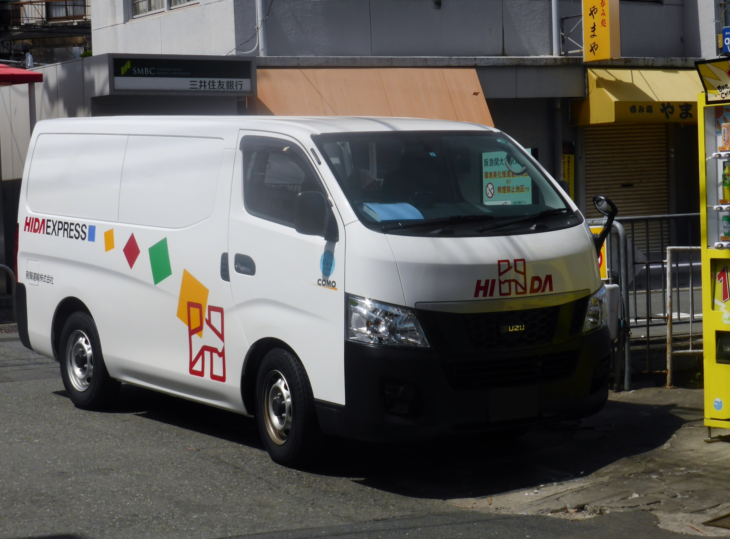 E26型いすゞ・コモをフロントから撮影。